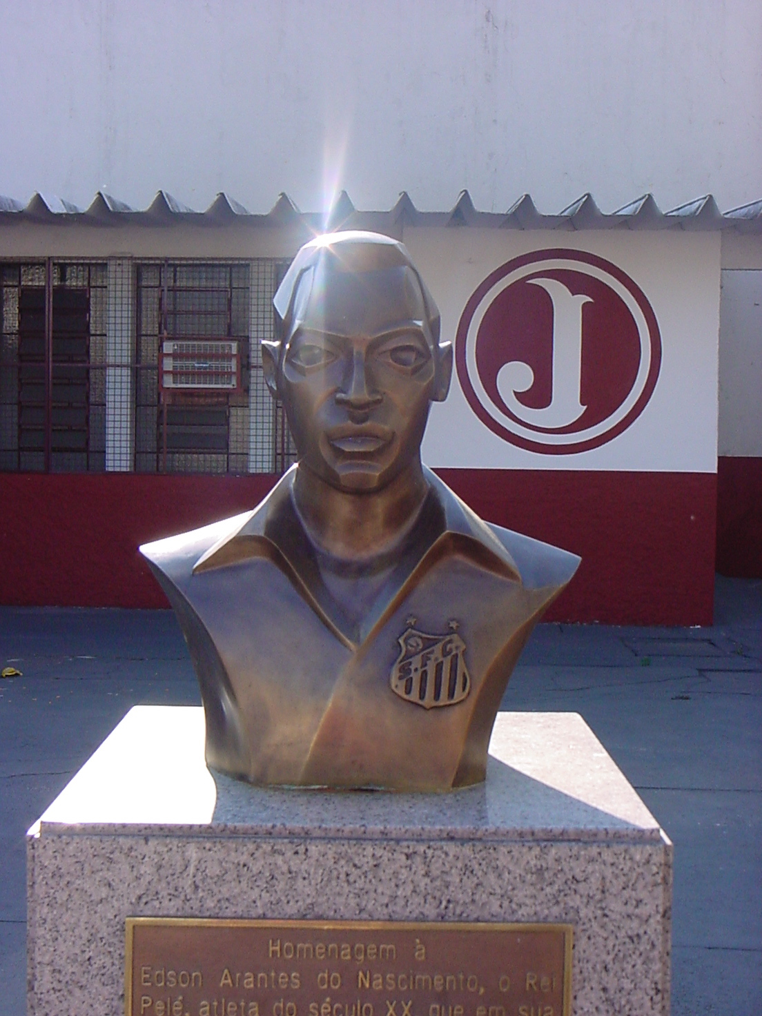 Pelé Bust on Rua Javari Stadium